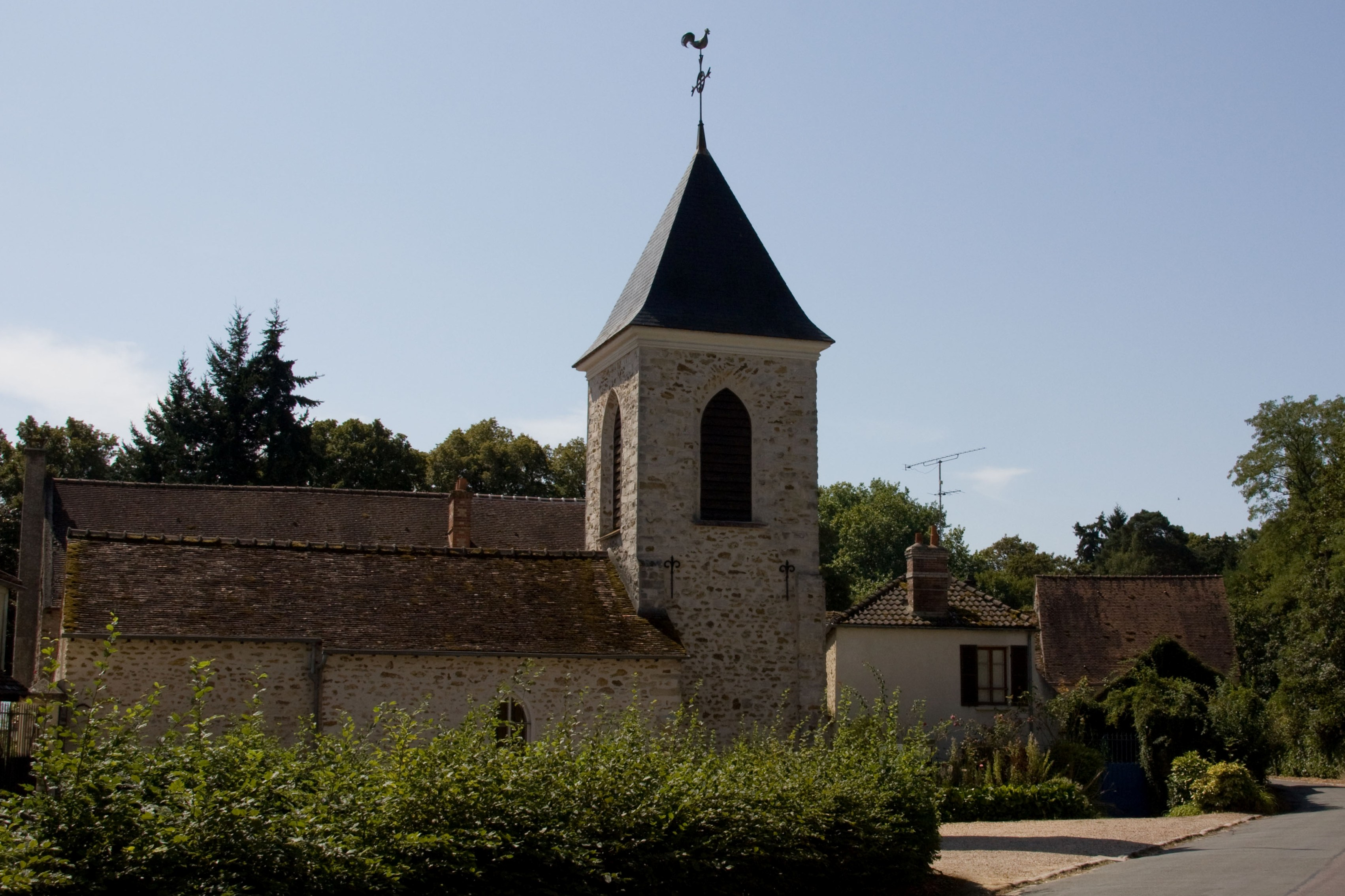 Eglise Saint-Lubin. Nainville-les-Roches, Essonne. France.